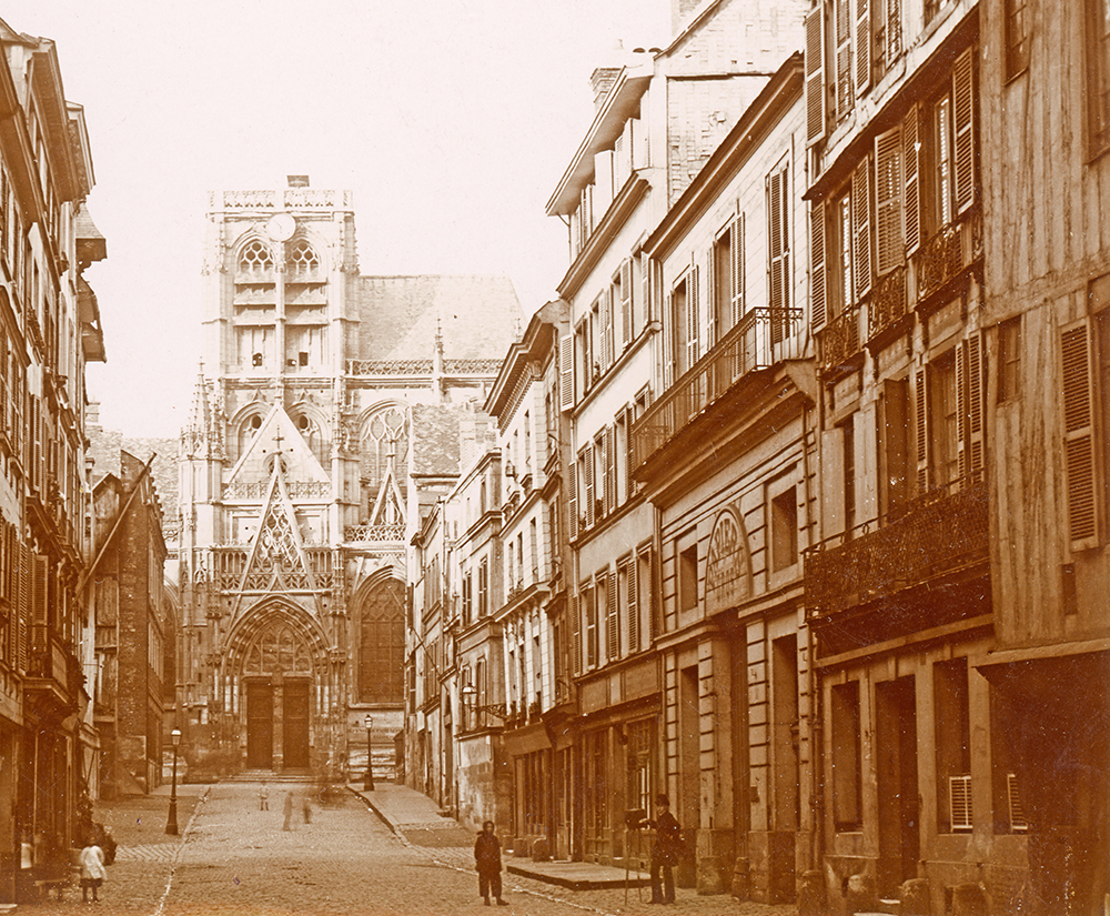 Eglise Saint Vincent à Rouen au XIXème siècle